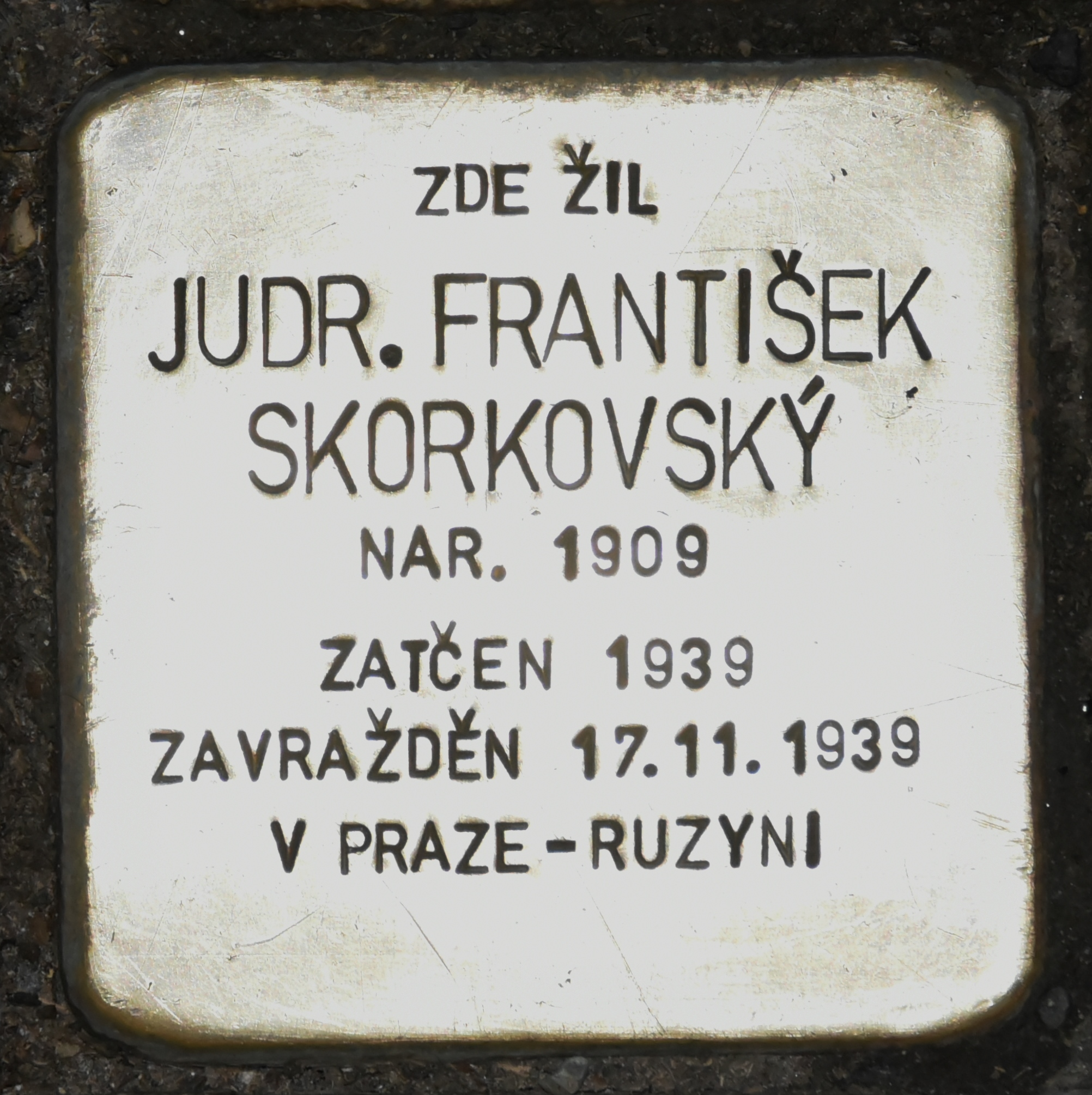 Stolperstein für Frantisek Skorovsky